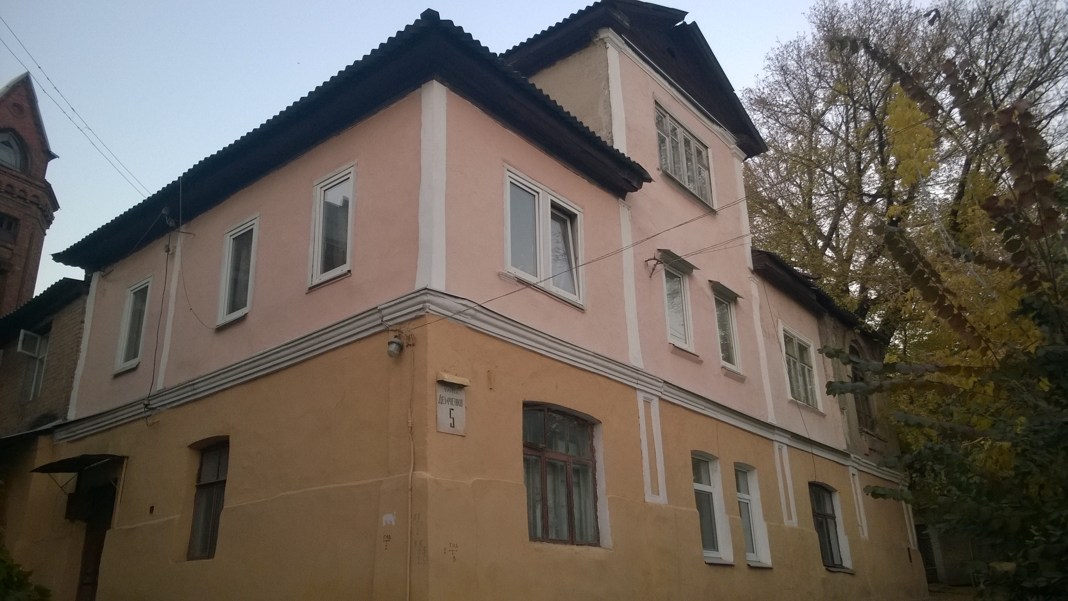 Житлові будинки, Харків, вул. Демченка, 3, 5